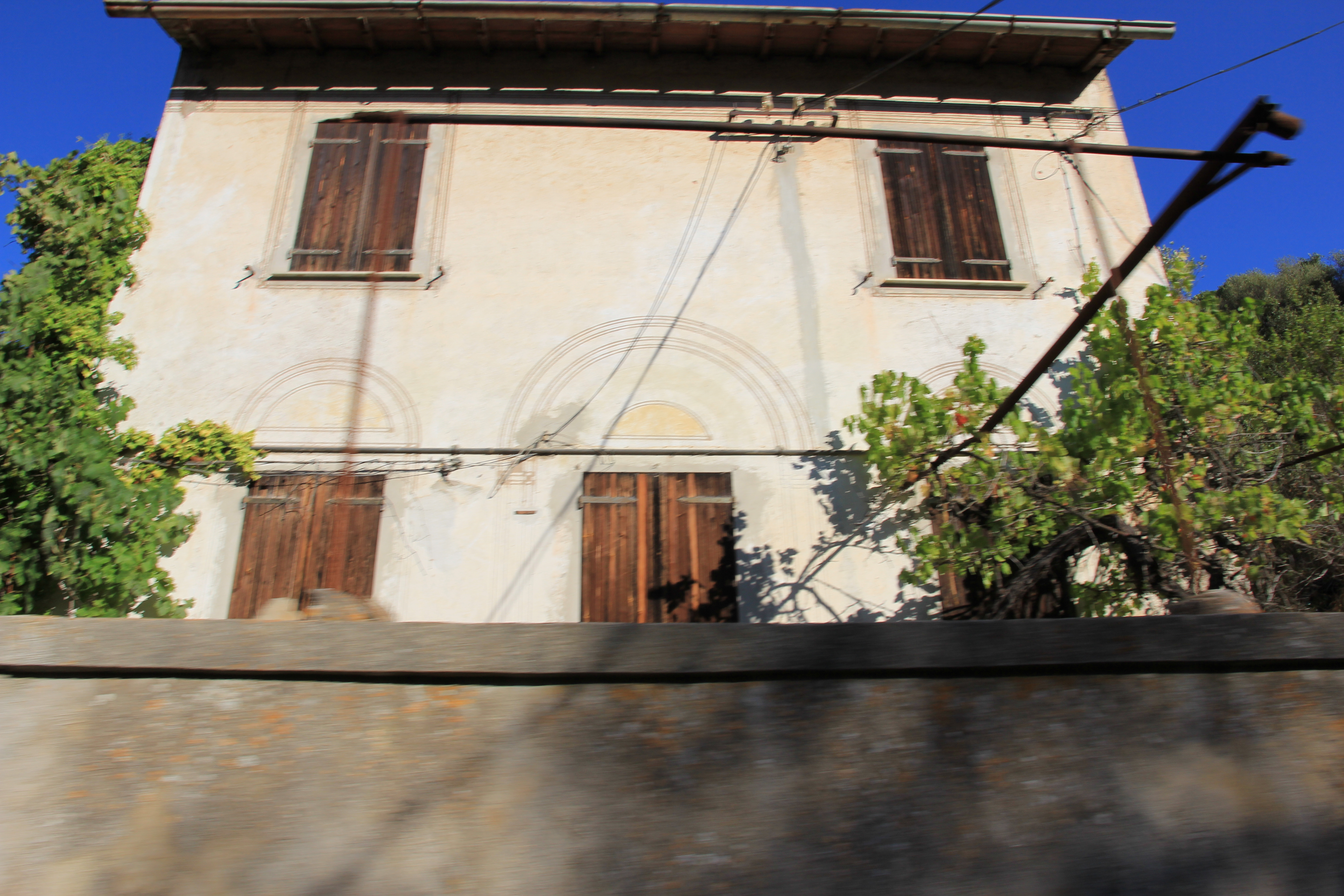 Sassari - Stazione ferroviaria di Filigheddu